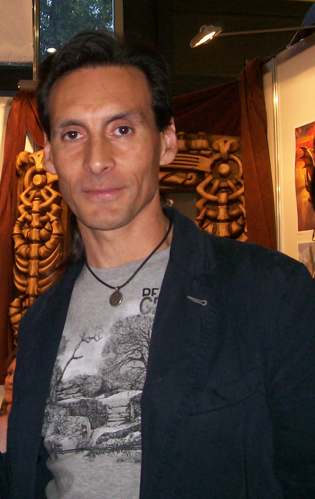 Ciruelo, dibujante argentino